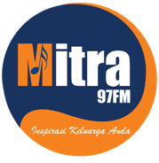 Logo Radio Mitra FM